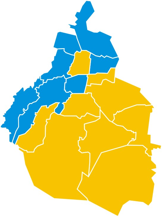 Mapa de los resultados electorales por delegación del Distrito Federal en 2000.